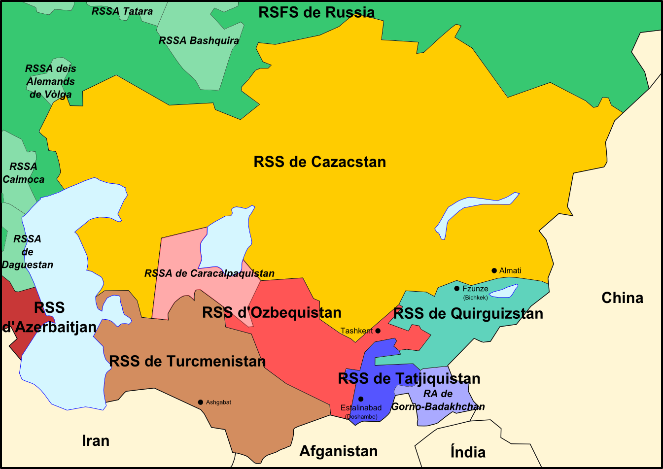 Asia Centrala Sovietica en 1936.